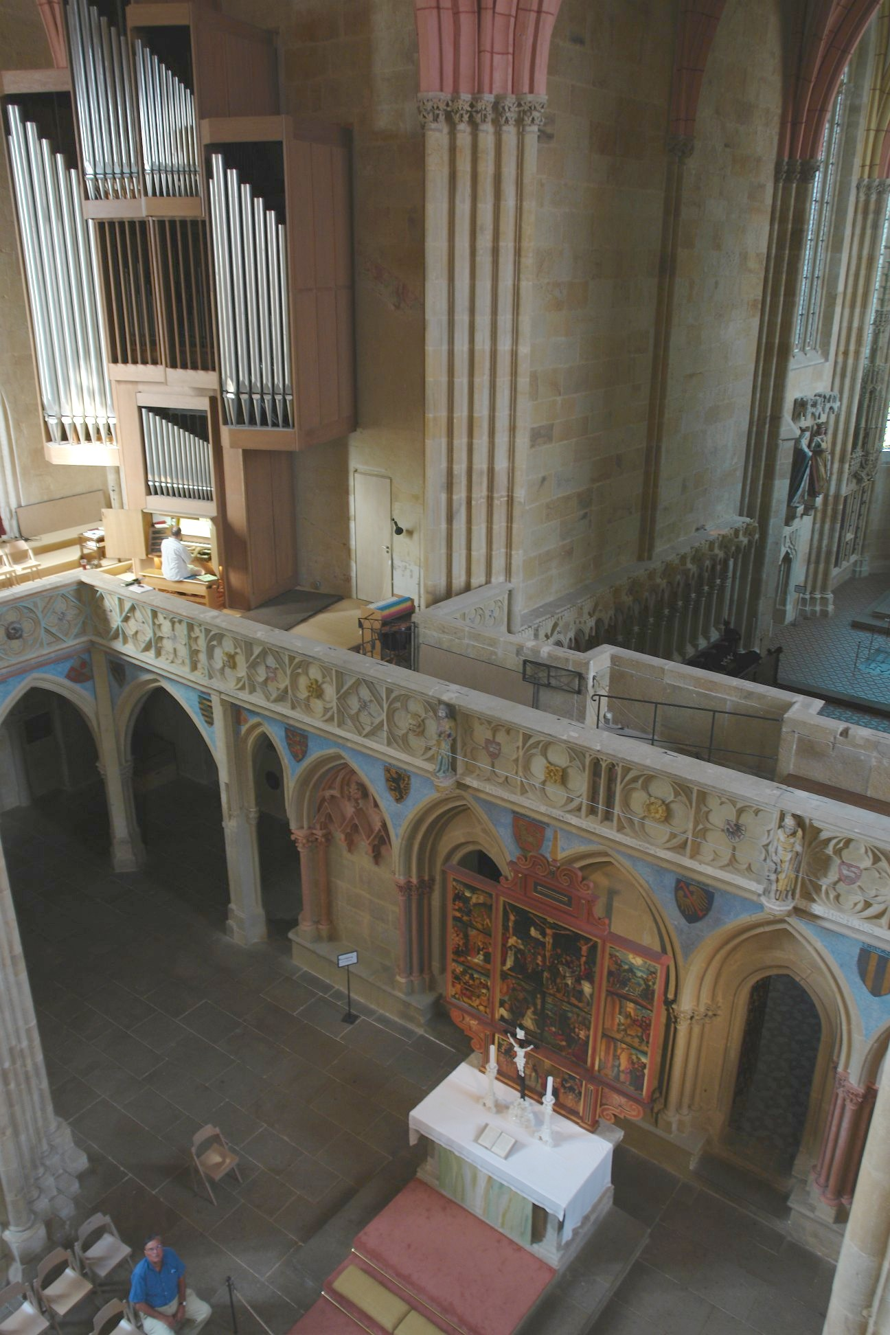 Lettner, Altar und Orgel. Im Hintergrund auch die Stifterfiguren des Doms.